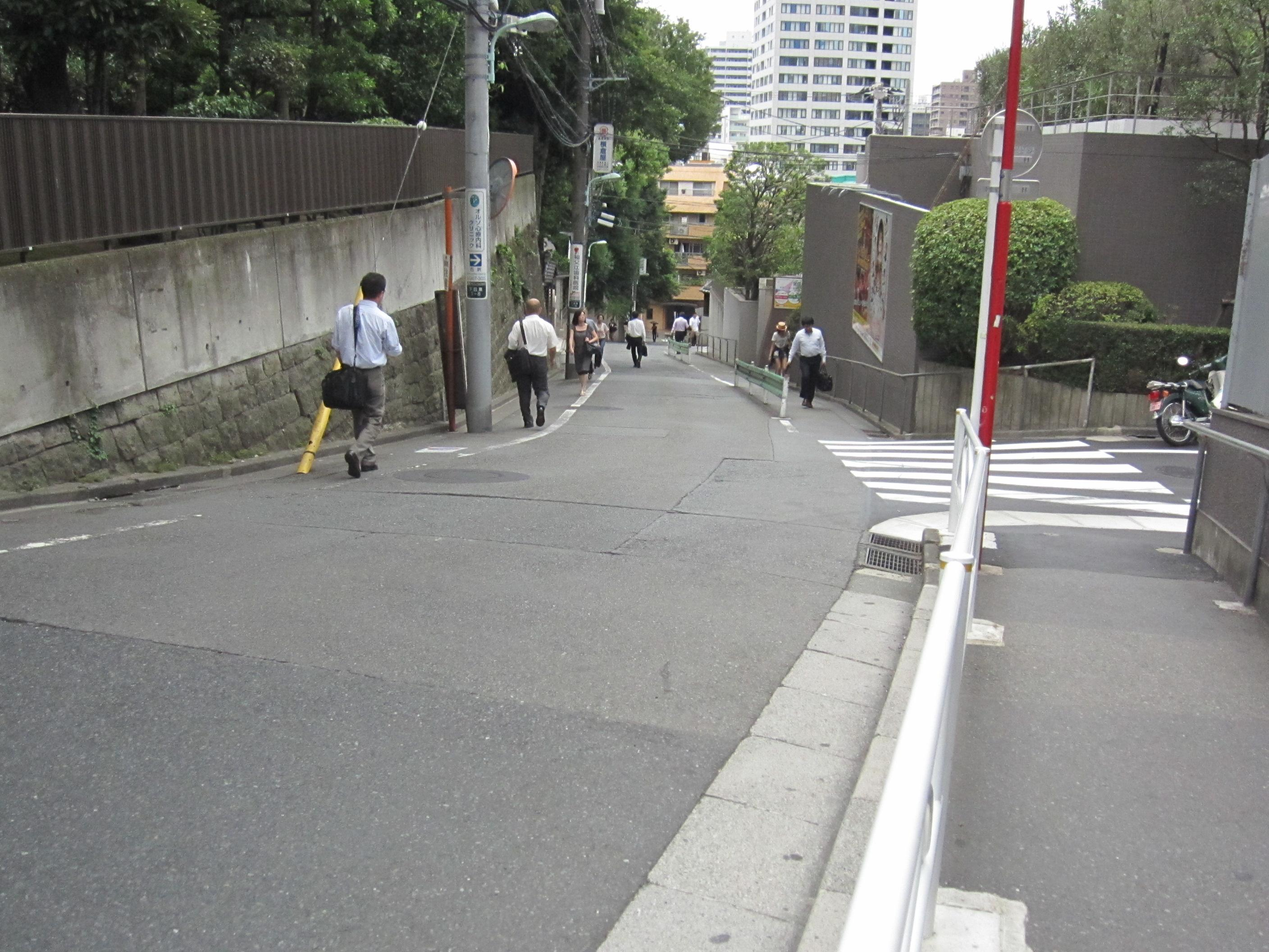 行人坂です